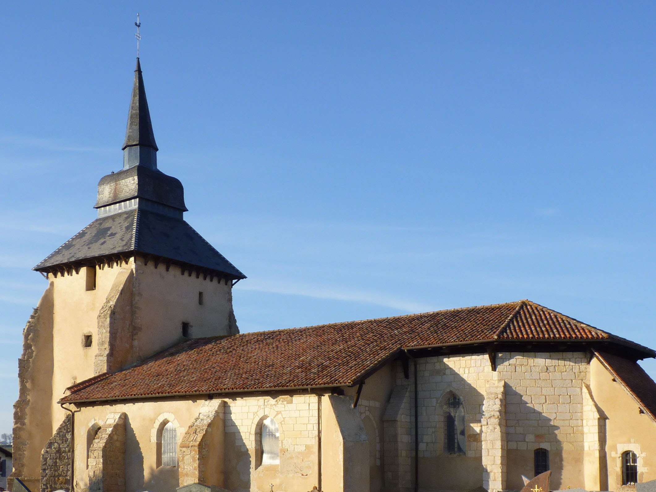 Eglise de Poyartin